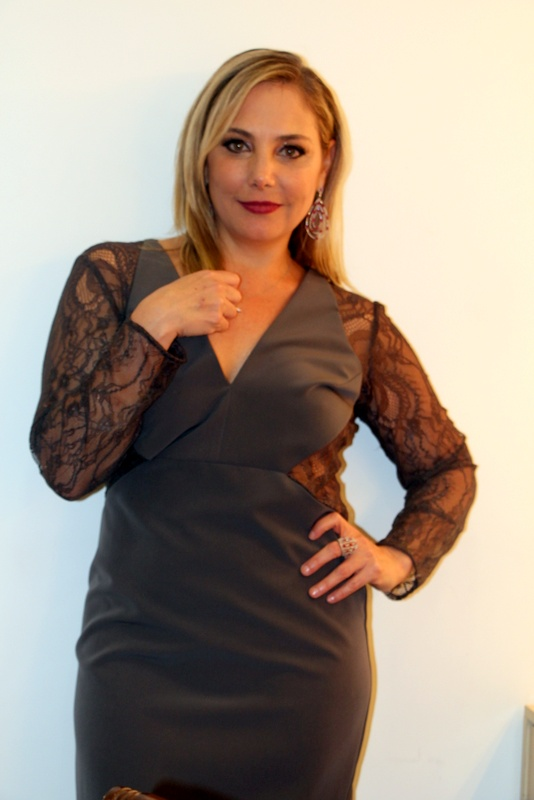 Heloísa Périssé-004